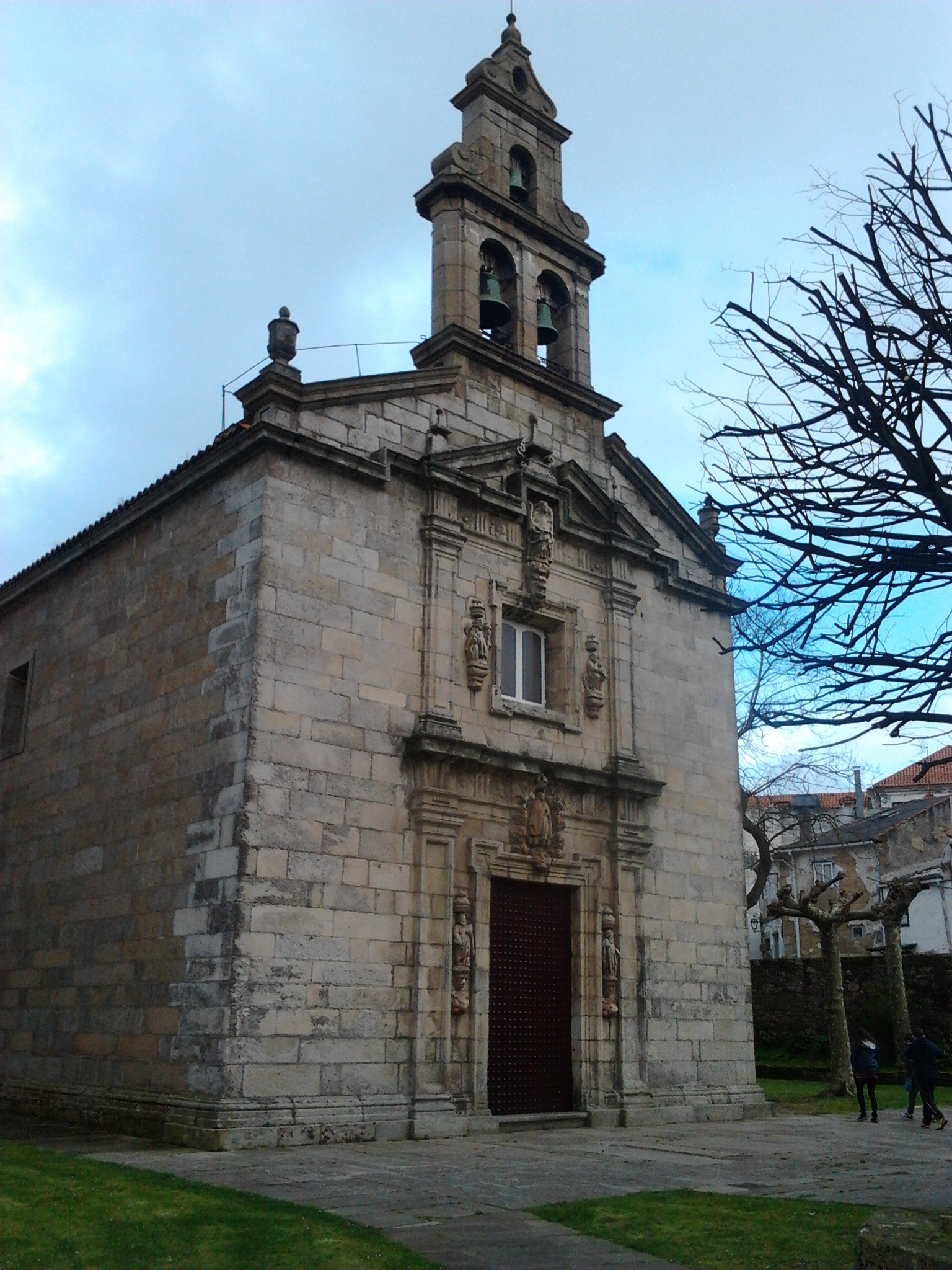 Portada do santuario de Pastoriza, de estilo barroco (1688), situado no concello de Arteixo. Aquí bautizaron a Manuel Murguía.